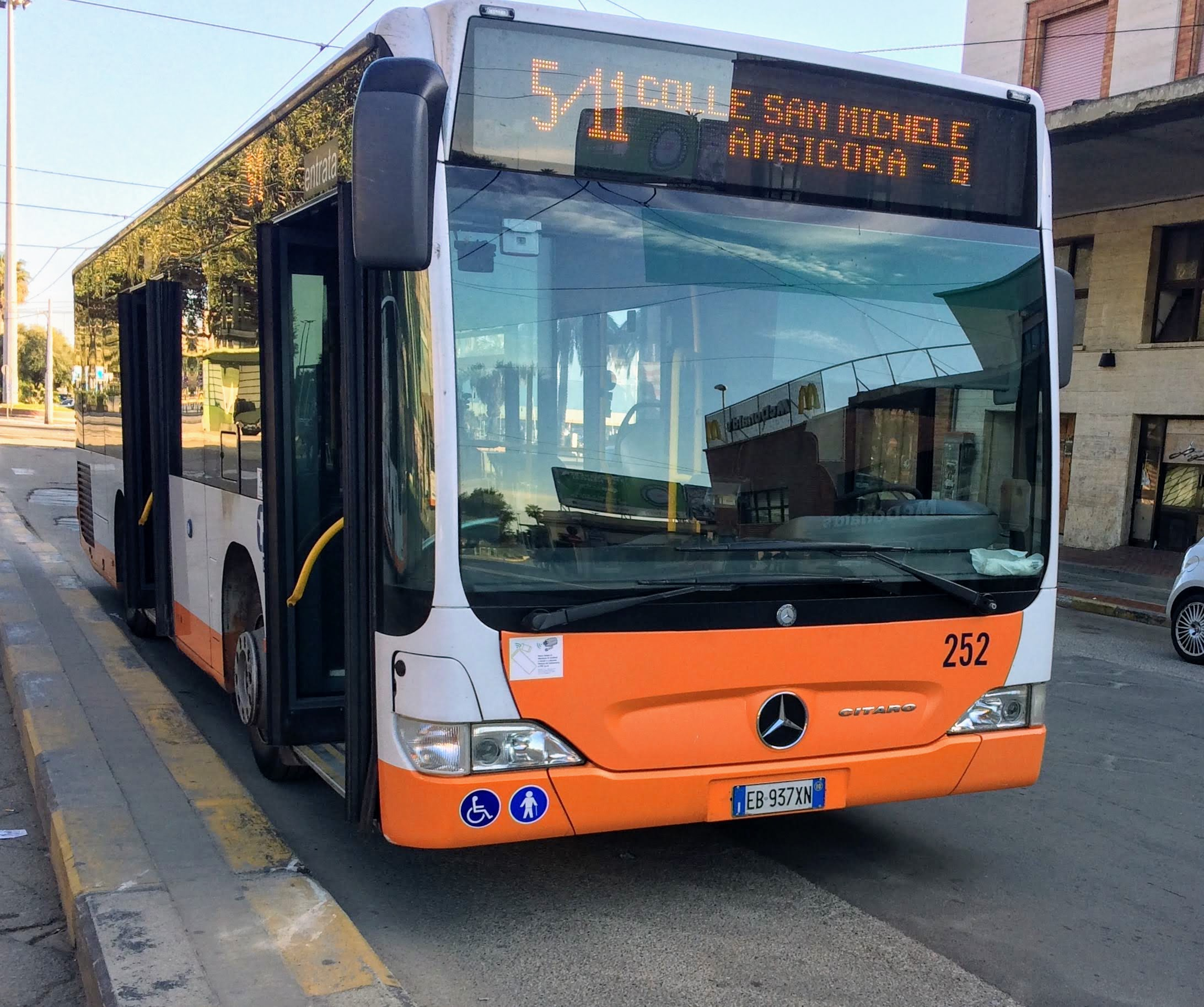 Mercedes-Benz Citaro 10.5 m FaceLift della CTM Cagliari, matricola 252, fermo al capolinea della linea festiva 5/11